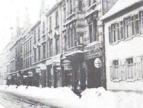 Frankfurt Bockenheim, Leipziger Straße 32, historisches Foto mit Blick auf Niederlassung des Autohauses Fritz Opel & Co. in Nachbarschaft von Forell's Garten, bzw. Gasthauses DEUTSCHER HOF. Seit dem 01.05.1877 hatte hier zuvor der badische Weingroßhändler und Politiker Julius Menzer (1845-1917) eine weitere Weinstube analog einer 1840 vom Vater gegründeten berühmten griechischen Weinstube ZUR STADT ATHEN in Neckargemünd eröffnet, mit deren Ausmalung er vor Ort ebenfalls den Frankfurter Künstler Karl Julius Grätz (1845-1912) beauftragte. Später eröffnete er weitere Niederlassungen im Kaiserreich, so am 01.05.1883 seine Niederlassung in der Reichshauptstadt Berlin. Sein Tod und die Auswirkungen des Ersten Weltkrieg führten zur Aufgabe des Weinhandels vor Ort. Diese Frankfurter Immobilie hat den Zweiten Weltkrieg fast unbeschädigt überstanden. Nach dem Autohaus Fritz Opel, später Autohaus Georg von Opel und deren Rückzug vor Ort, betrieben hier ein Textileinzelhandel und ein Steuerberater ihre Geschäfte. Zur Zeit sind hier ein Imbiß und eine Praxis für Fußpflege tätig.